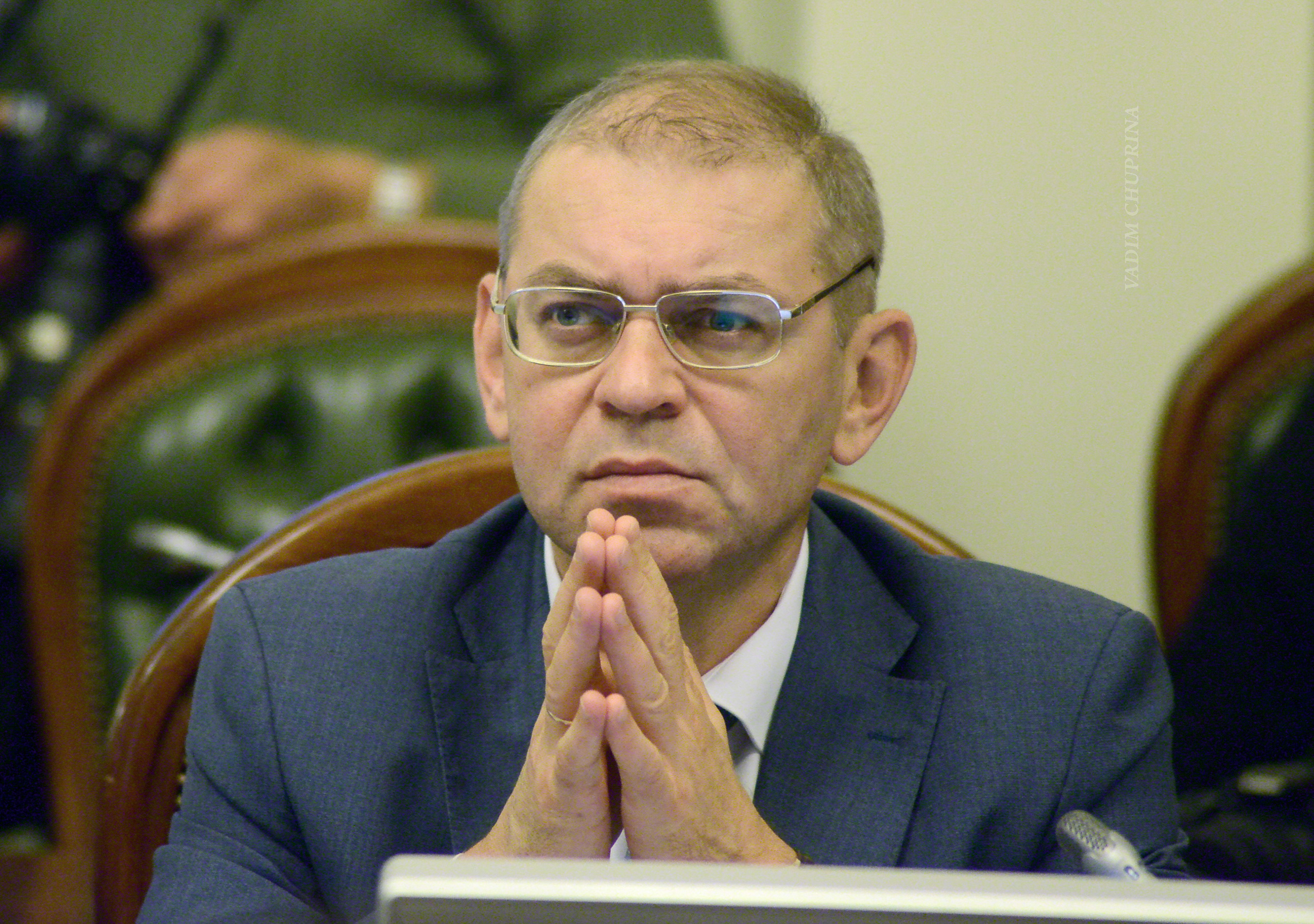 Верховная Рада Украины , фото Вадим Чуприна 2016